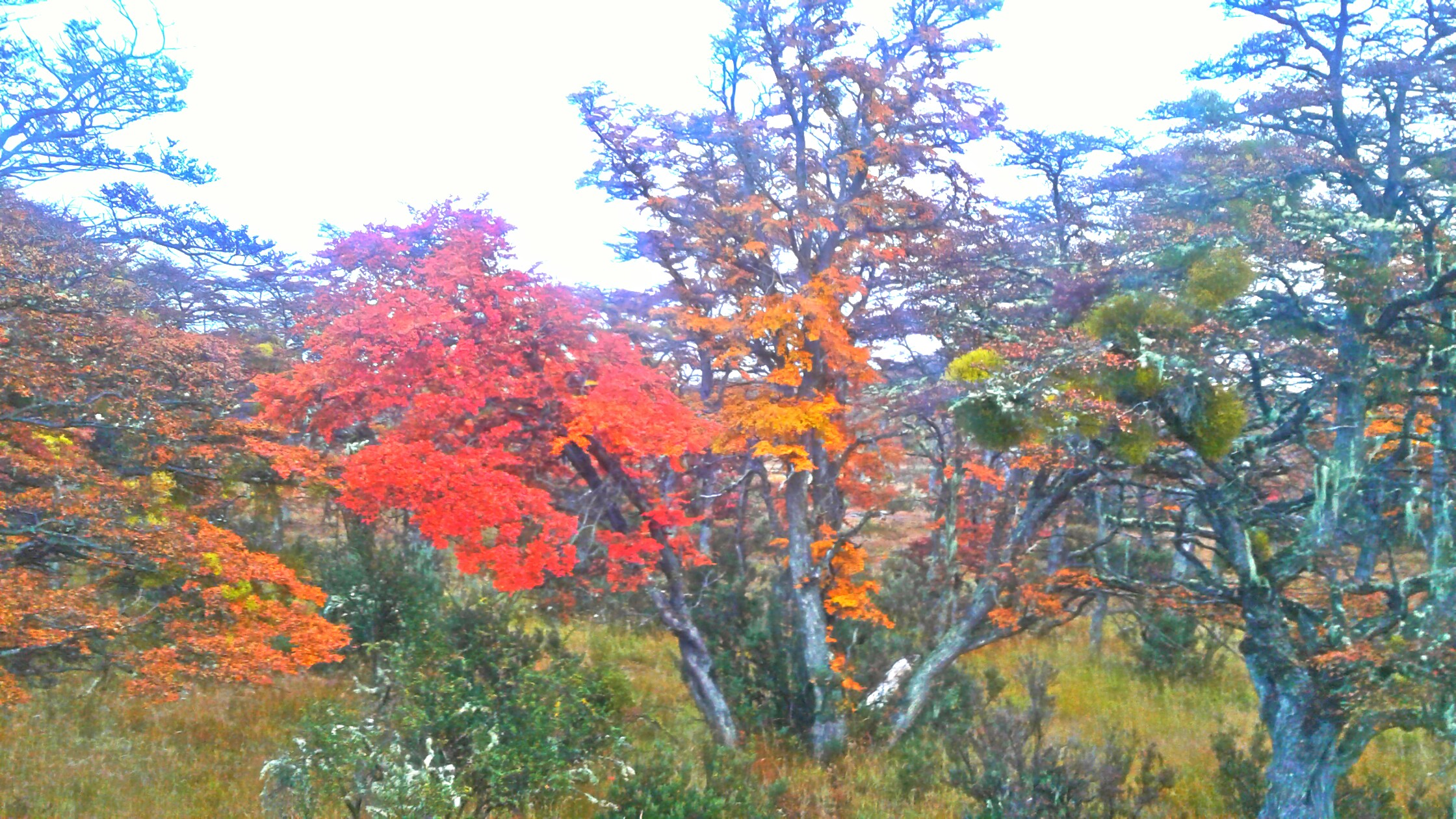 Árboles y arbustos en la Región de Magallanes y de la Antártica Chilena. Mayo de 2014.